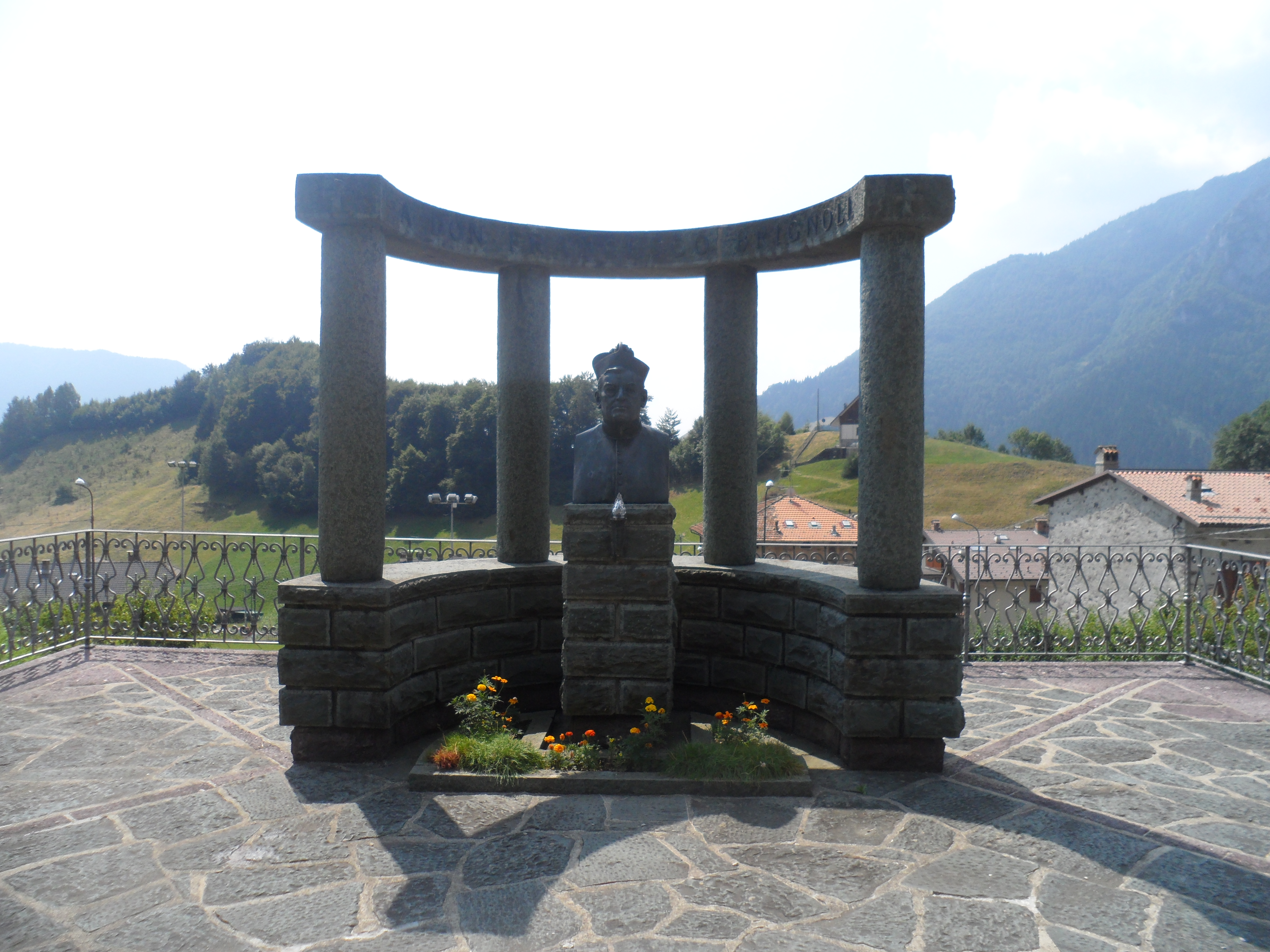 Lapide commemorativa di don Francesco Brignoli